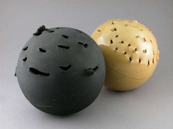 Lucio Fontana. Sfere (concetto spaziale sferico). Terracotta con vetrina e terracotta con ossido, 1957.